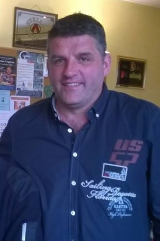 Phillipe Albert en 2014